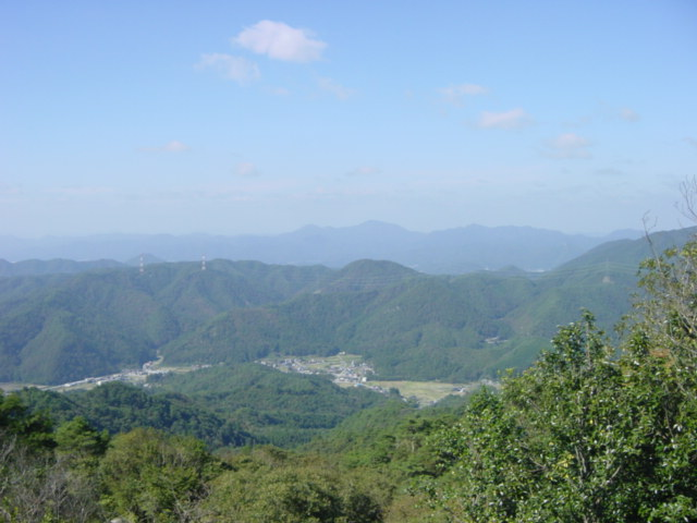 大野山から北側の眺望。